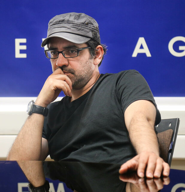 نیما جاویدی